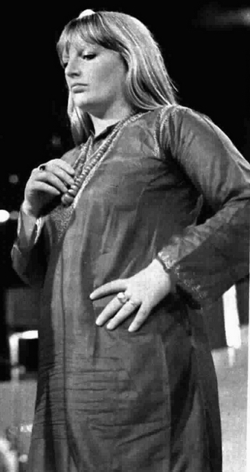 Italian singer Gabriella Ferri